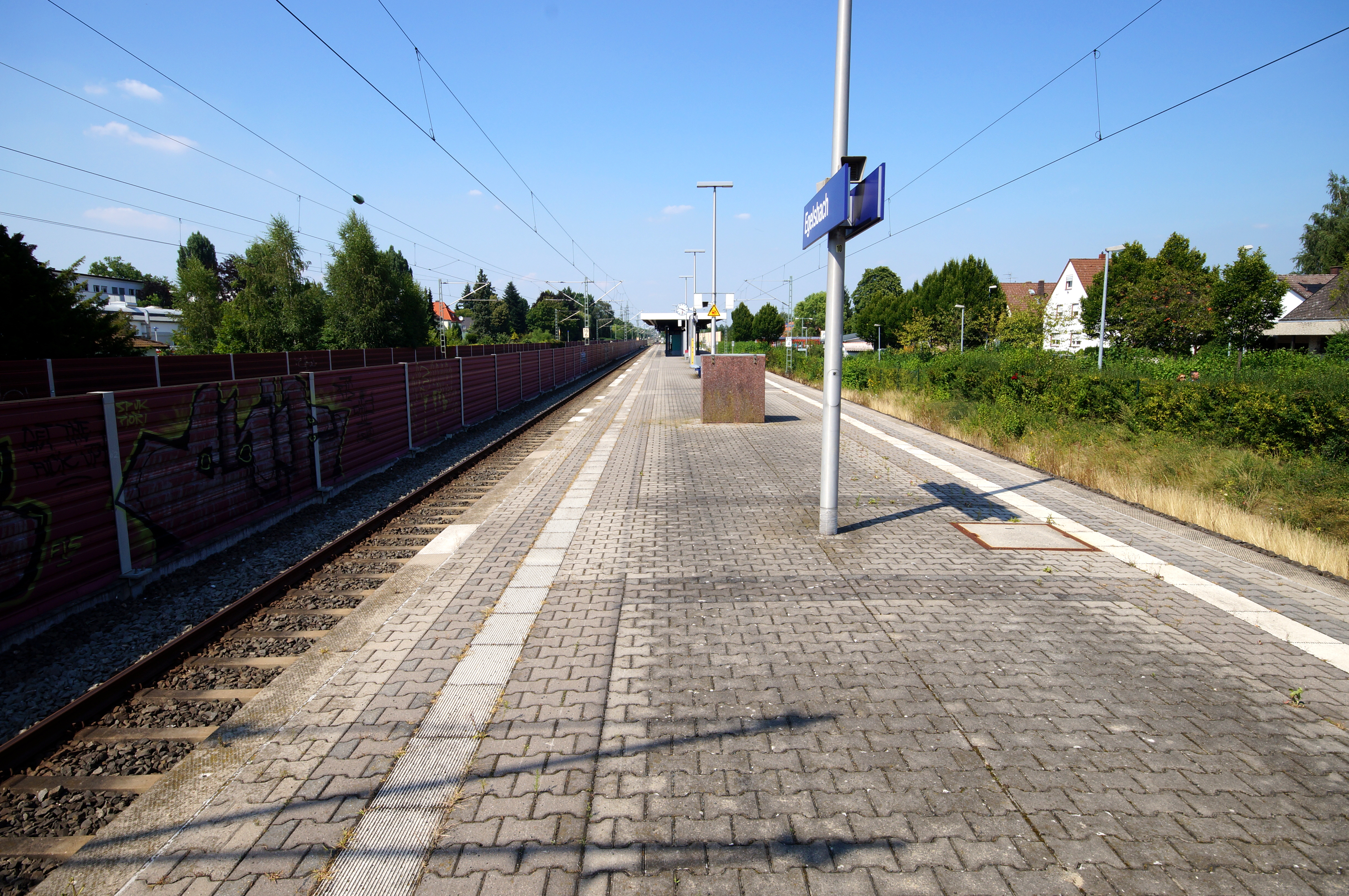 Die Bahnsteige des Egelsbacher Bahnhofs